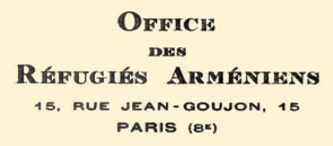 Logo de l'Office des réfugiés arméniens (1924-1942)